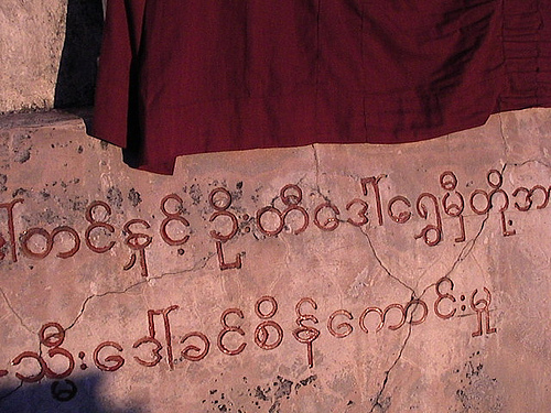 Inscription sur un mur